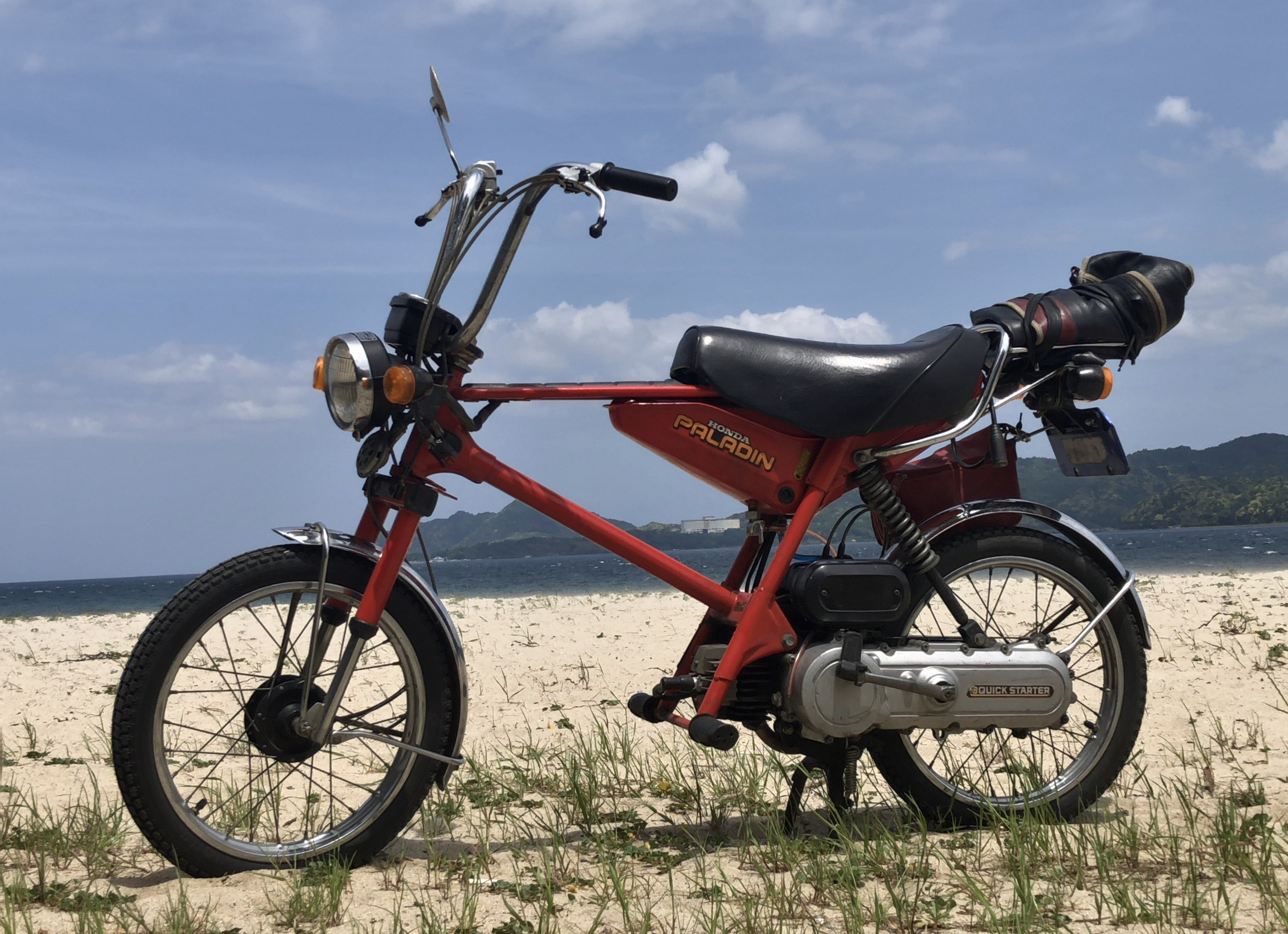 1978年製 ホンダ パルディン（NC50）